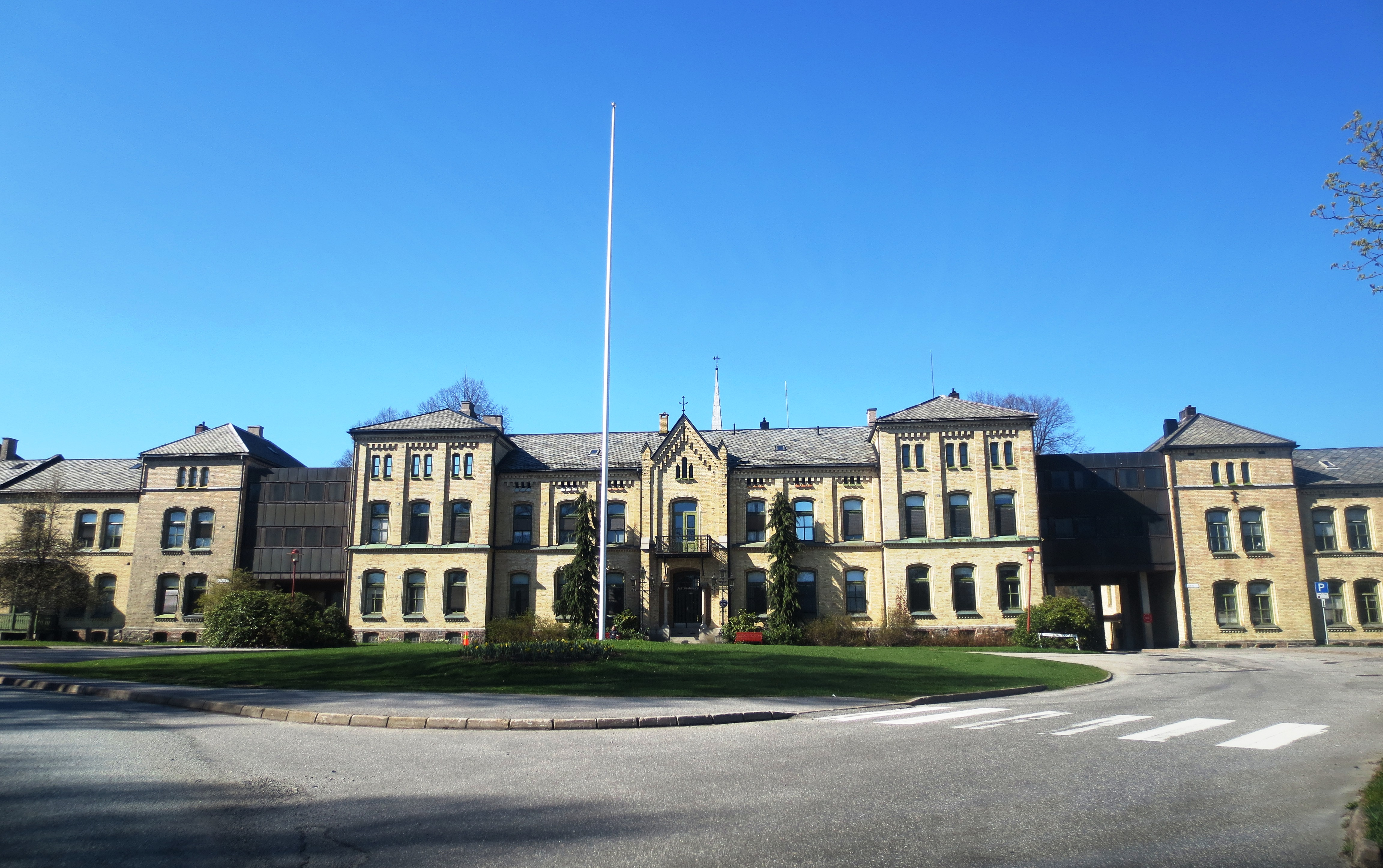 Det opprinnelige Ek Sykehus (Eg Asyl), nord i Kristiansand.